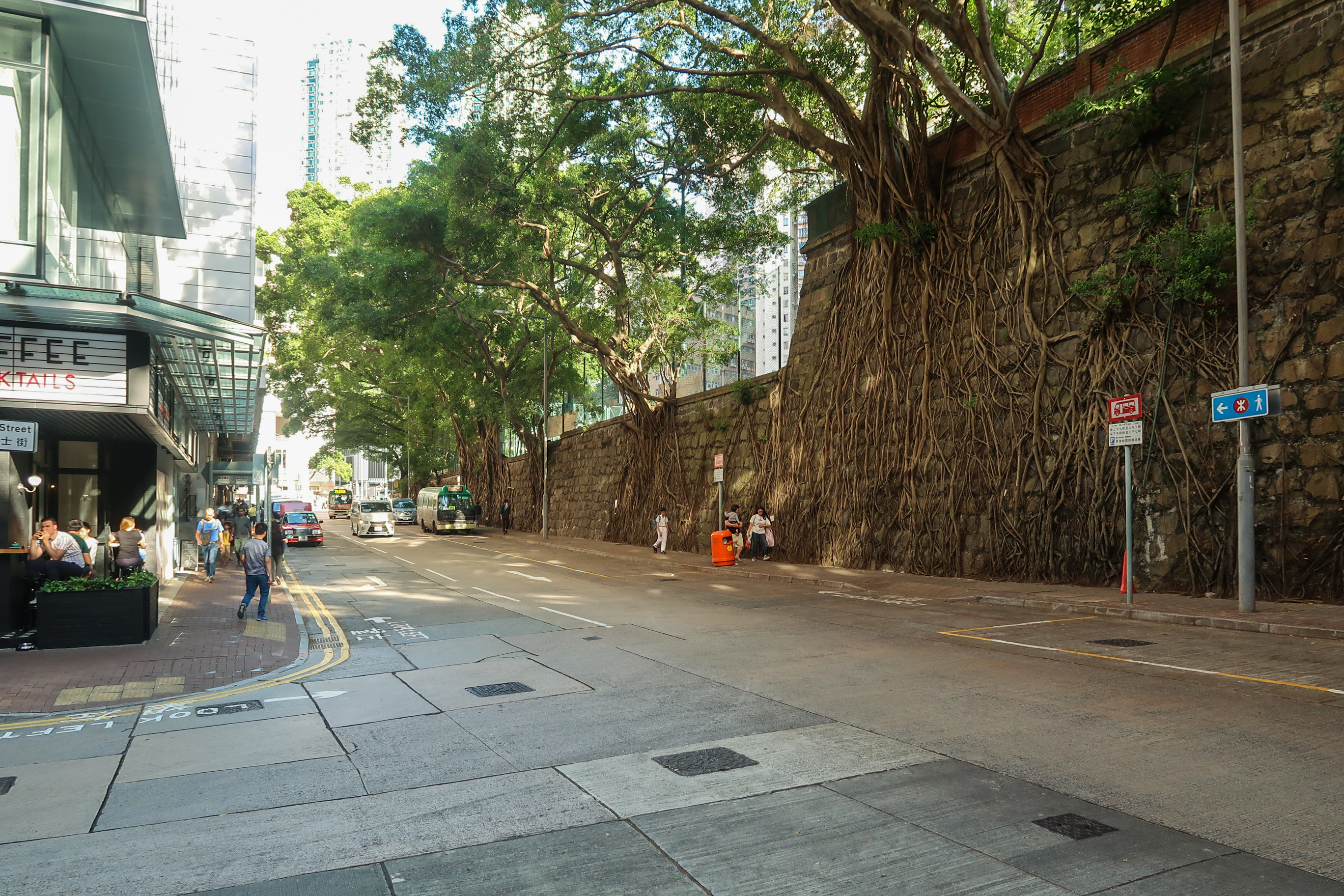 Forbes Street